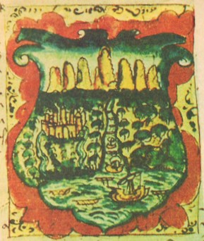 Dibujo del Escudo de Armas de Santiago de Cali (Colombia) que vino integrado en la real cédula del el 27 de junio de 1559 que concede las armas a dicha ciudad.